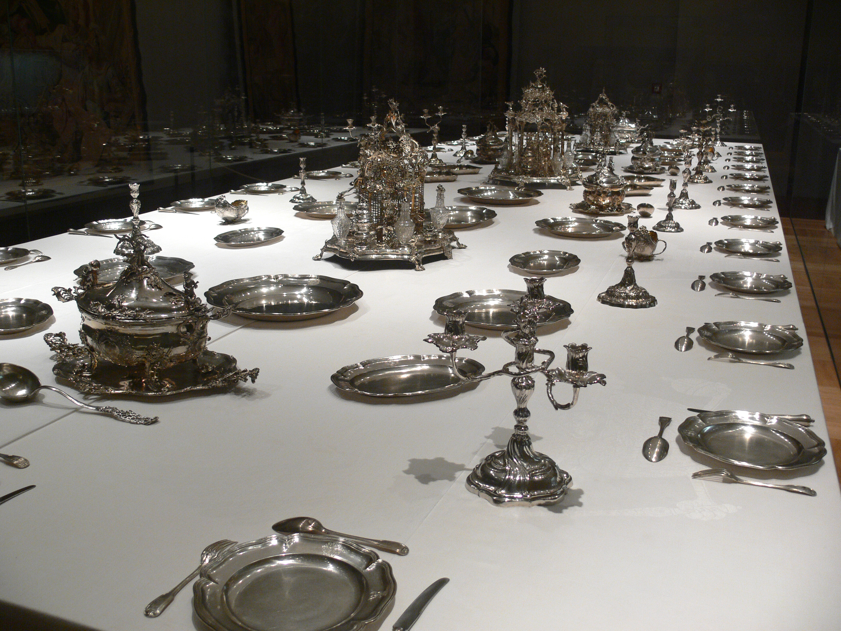 Das Augsburger Tafelservice der Fürstbischöfe von Hildesheim (das weitaus vollständigste der erhaltenen deutschen Silberservice des 18. Jahrhunderts), geliefert 1763 an Bischof Friedrich Wilhelm von Westphalen Bayerisches Nationalmuseum, München